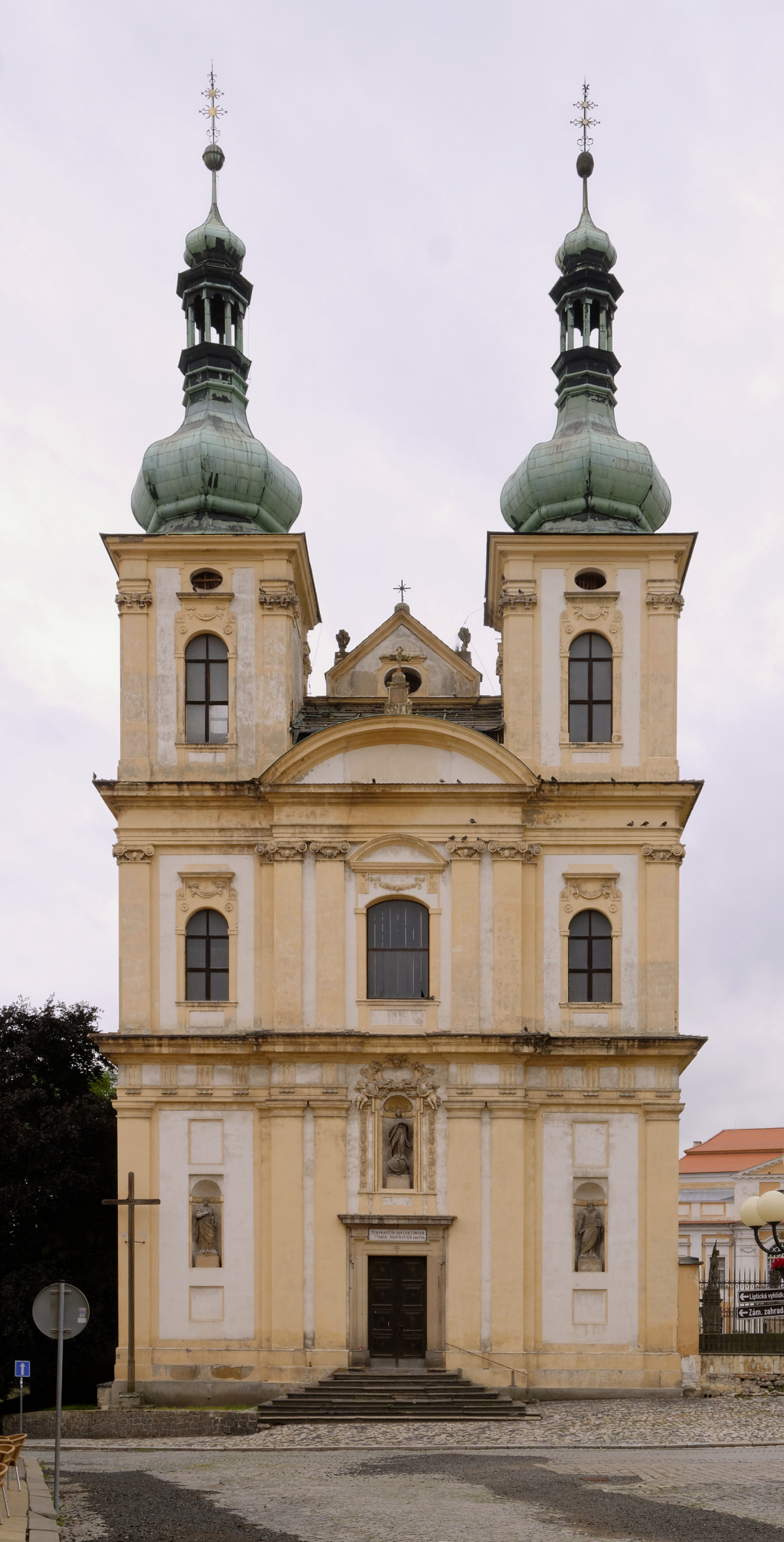 Kostel Zvěstování Panny Marie v Duchcově, východní průčelí.